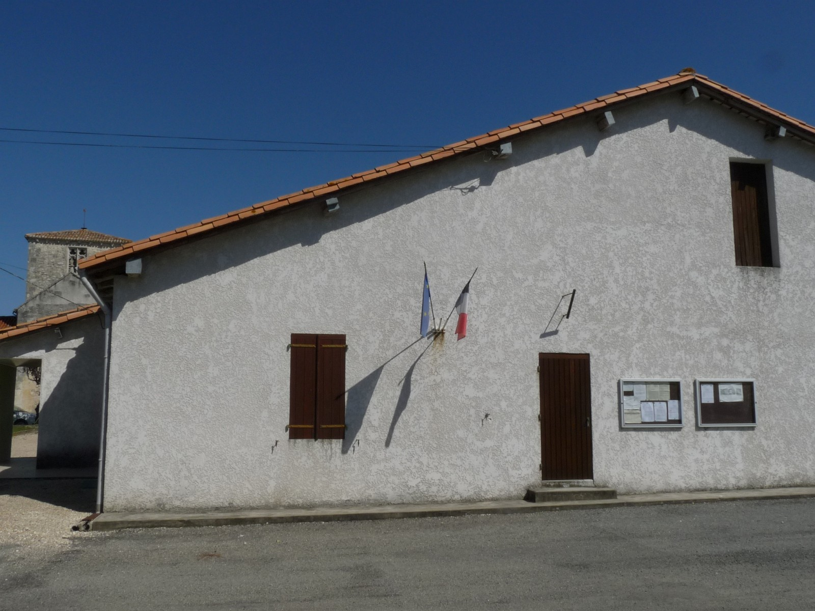 Mairie de St-Germain-de-Vibrac, Charente-Maritime, France